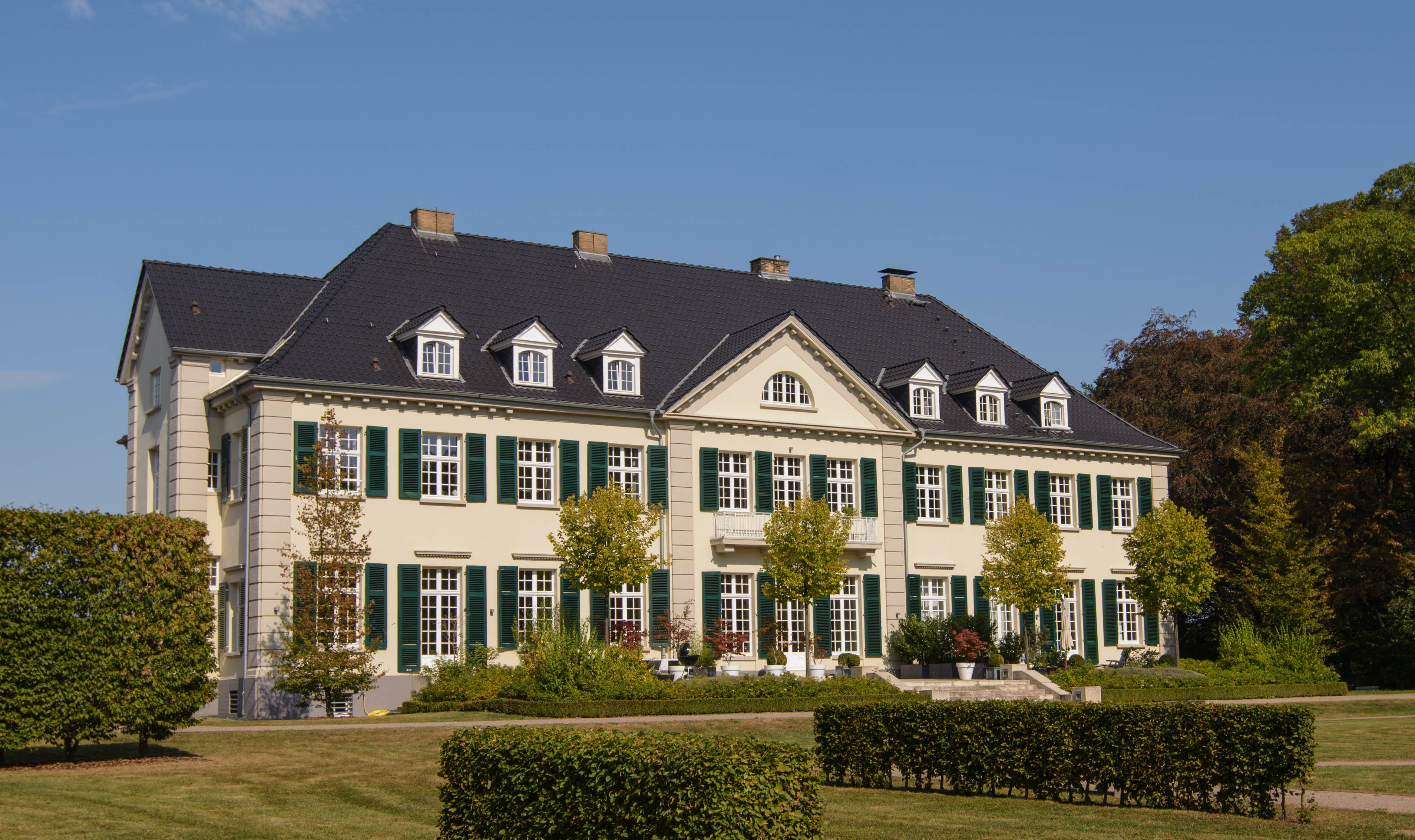 Schloß Laach; Rückansicht des renovierten Schlosses This is a photograph of an architectural monument.It is on the list of cultural monuments of Monheim am Rhein